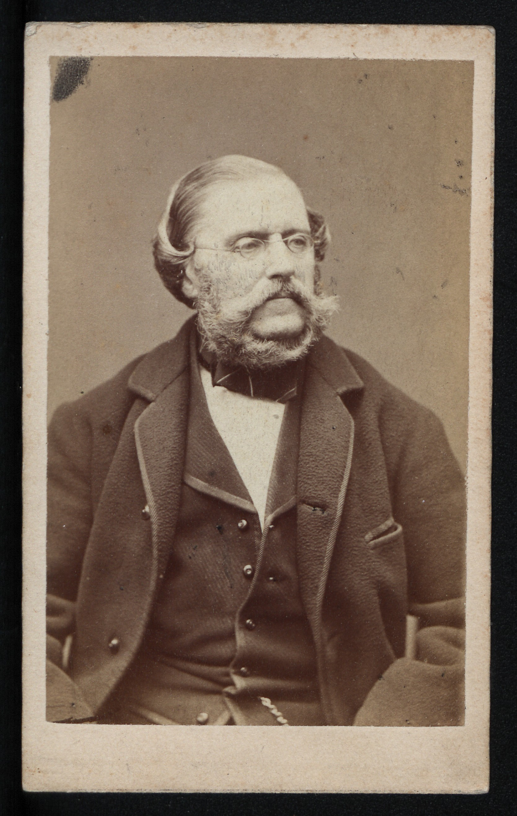 Karol Forster, [1860-1867]